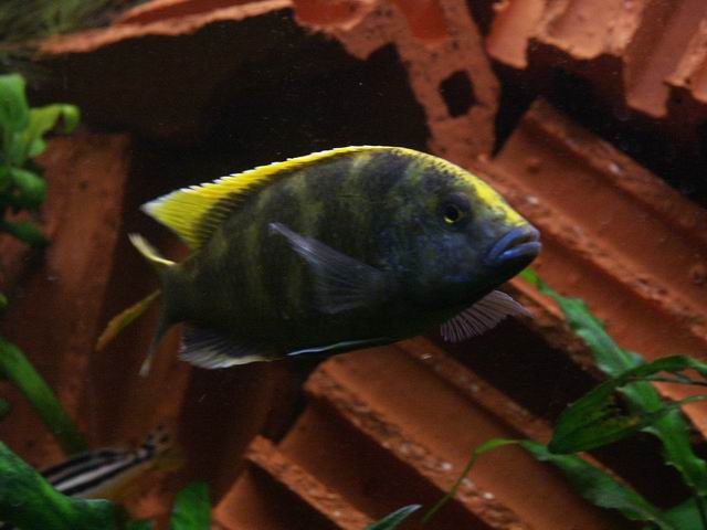 Nimbochromis Venustus männlich